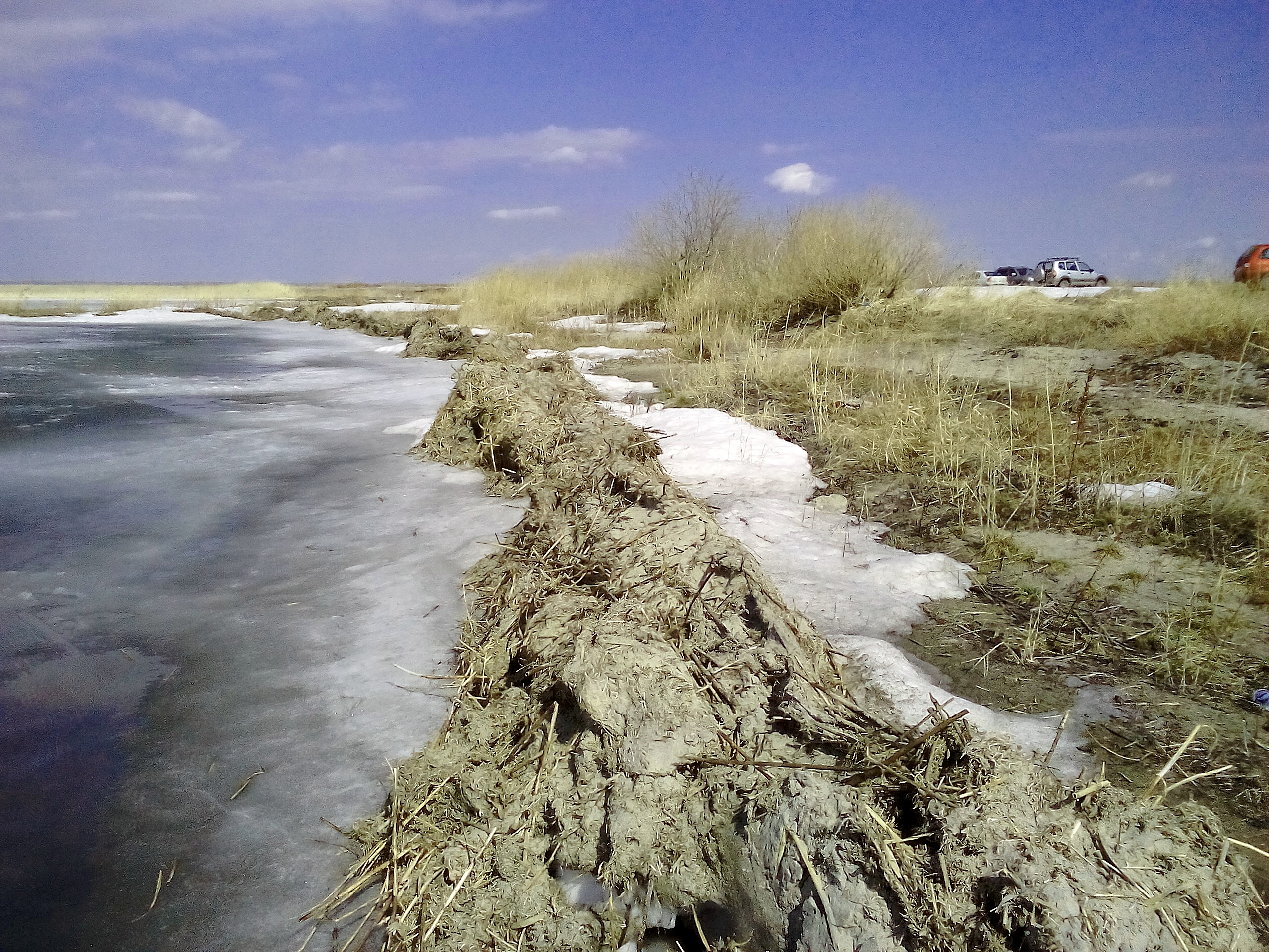 Береговая линия после шторма !